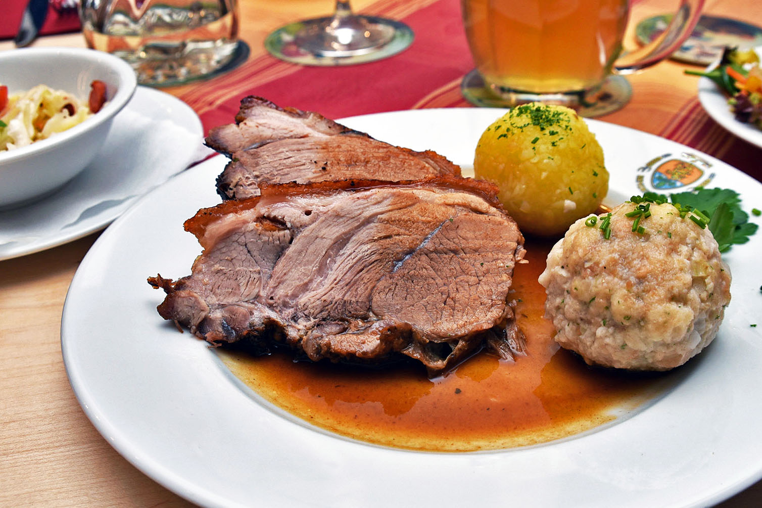 Schweinebraten mit Knödel und Krautsalat ist in Bayern das Nationalgericht.